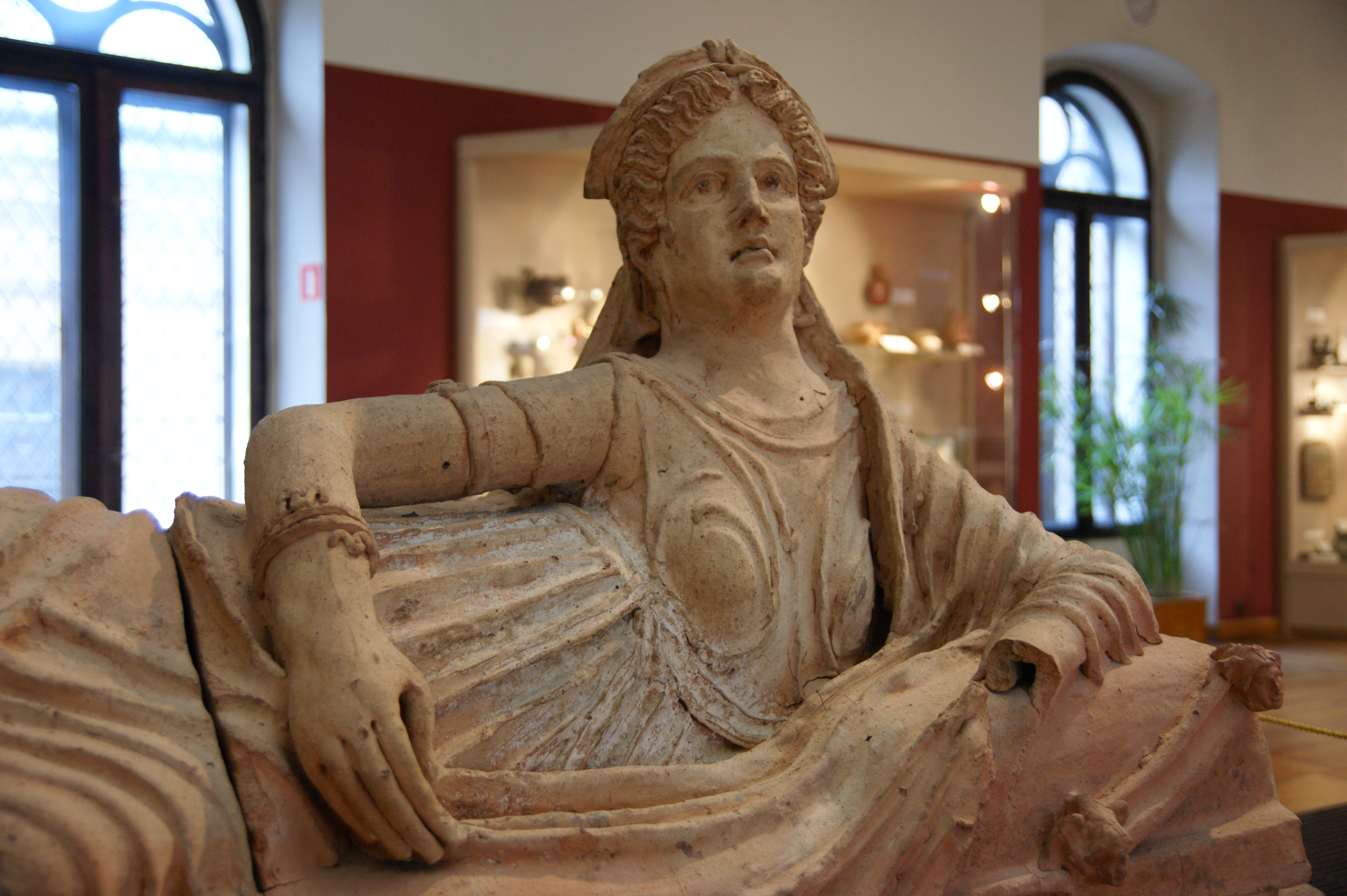 Muzeum Czartoryskich, Etruscan Sarcophagus